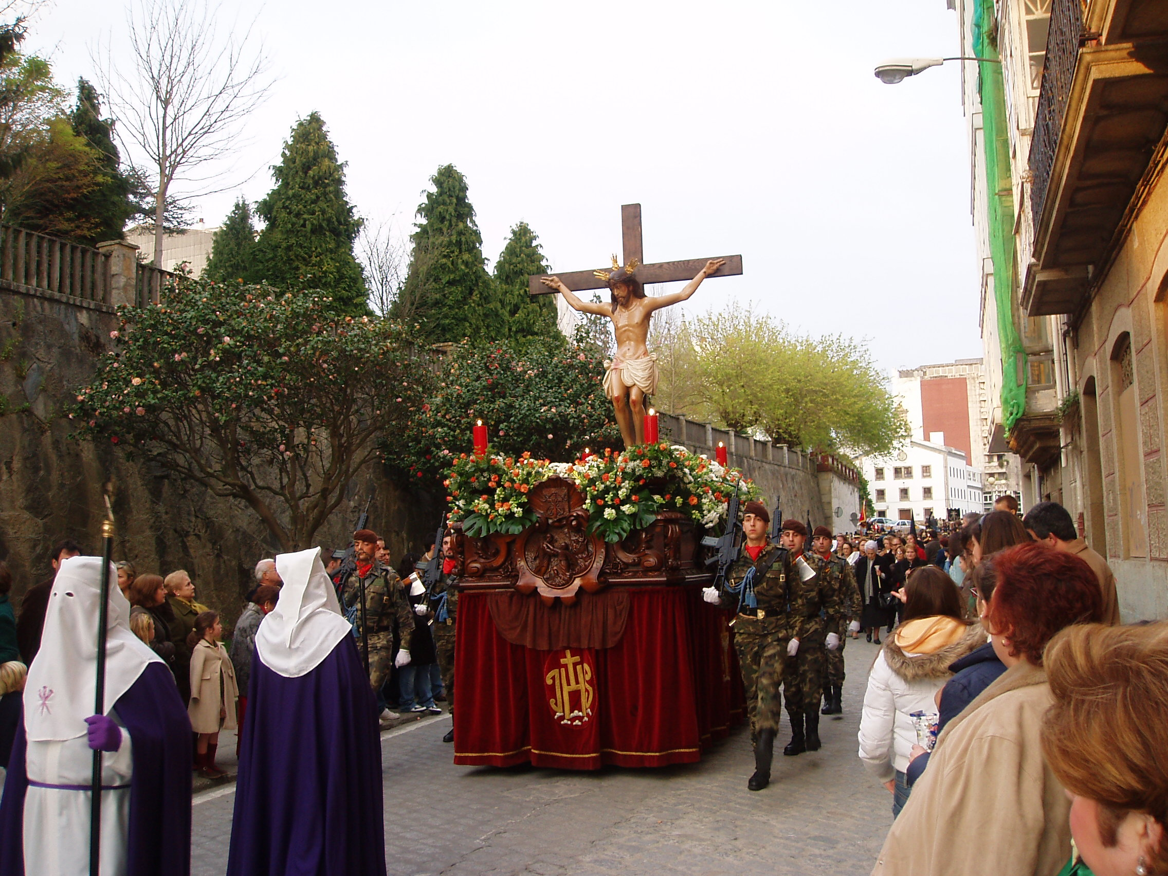 Cristo de la Luz y de la Buena Muerte. Martes Santo de 2.007.